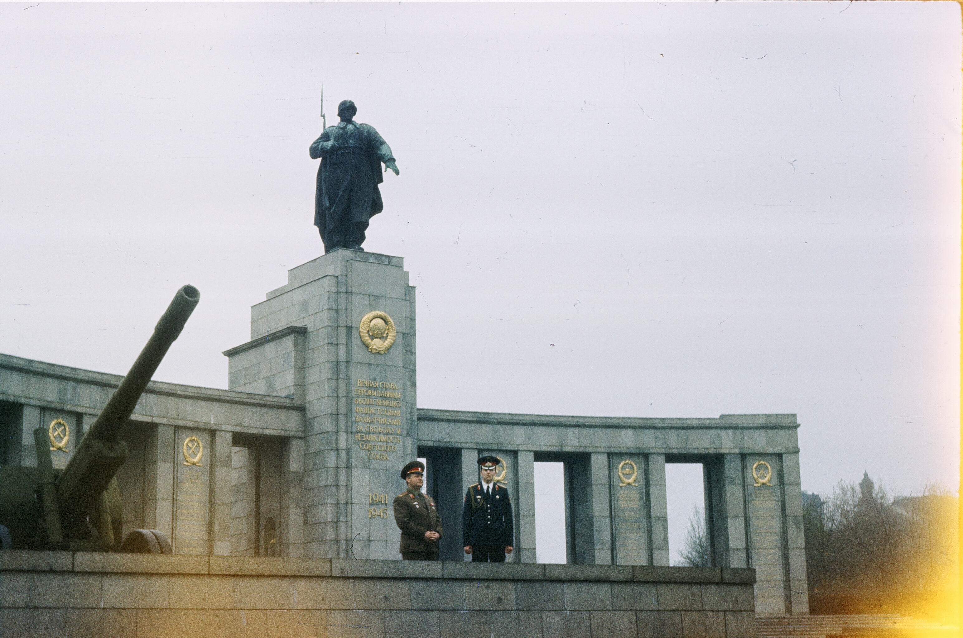 Памятник советским воинам в Тиргартене . Германия Западный Берлин 1981 год.